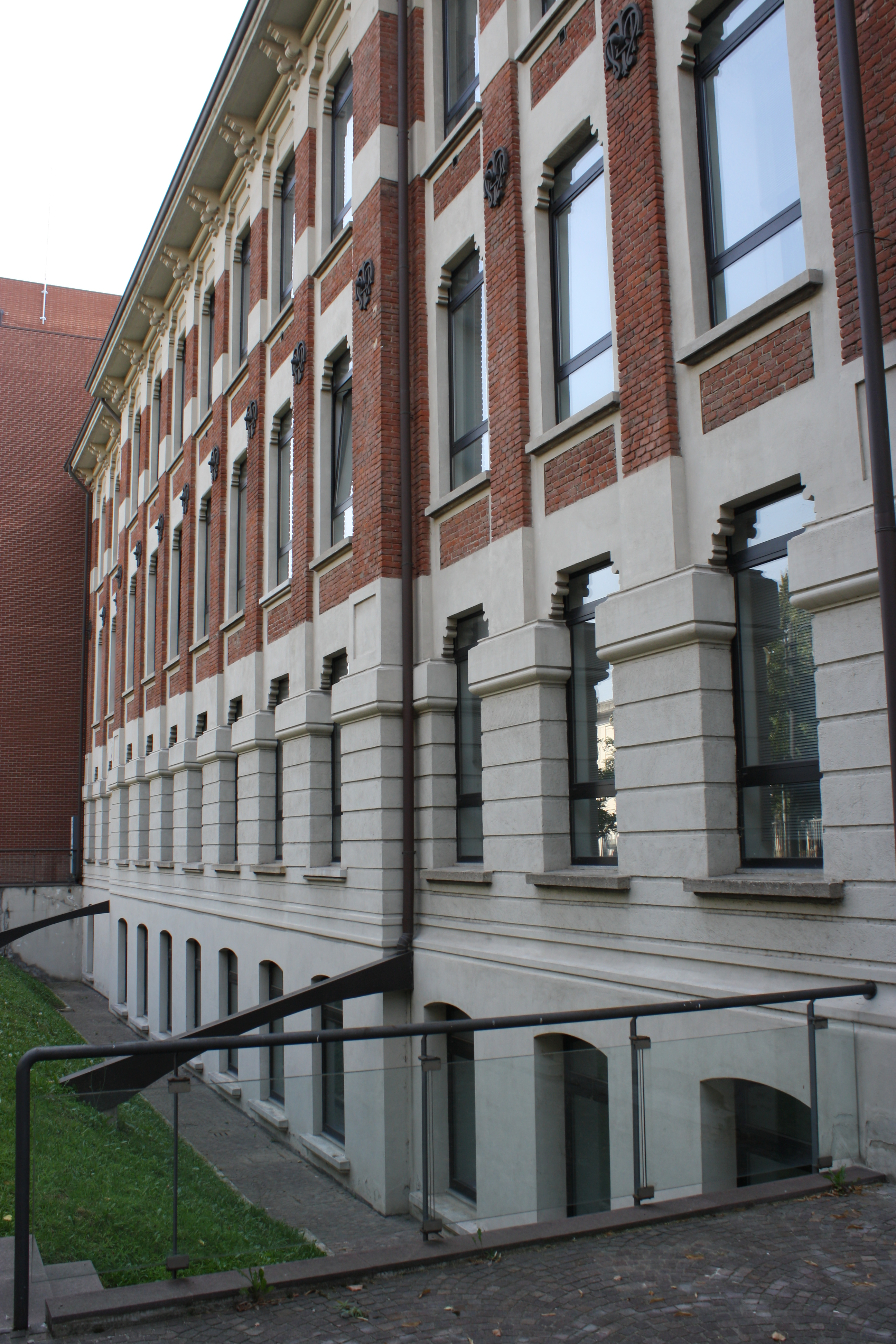 Particolare della facciata dell'edificio principale dei Molini Marzoli Massari di Busto Arsizio (VA).